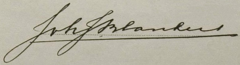 Подпись Йориса Бланкерта